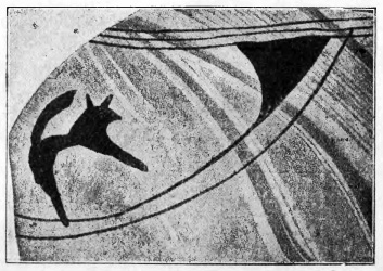 Черепок глиняної посудини з малюнком собаки, з галицьких нахідок (Більче Золоте) в музеї Наук. Тов. ім. Шевченка.